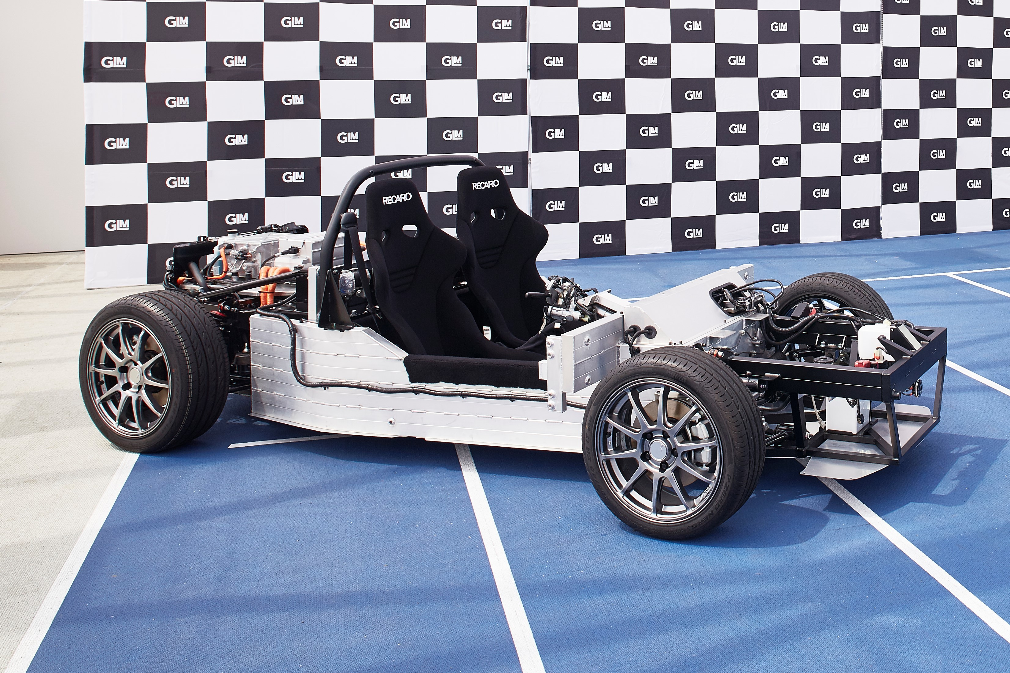 GLM 第1世代PF